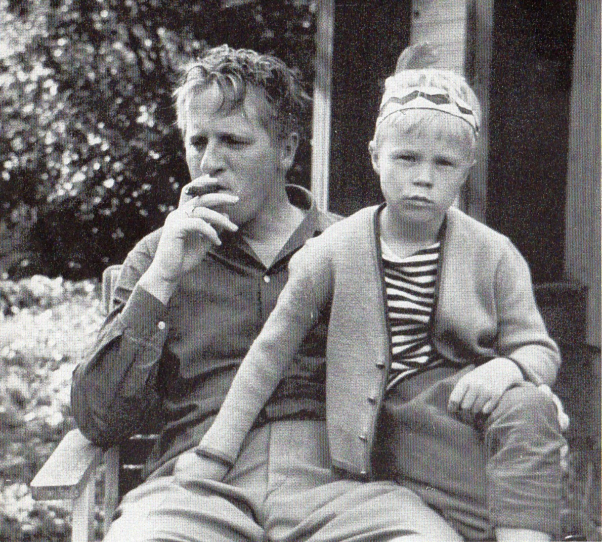 Suomalainen näyttelijä Veikko Sinisalo (1926–2003) vuonna 1961 poikansa Jarno Sinisalo (1956–2006) kanssa, joka myöhemmin toimi kapellimestarina.